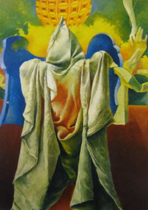 Jaroslava Pešicová: Requiem